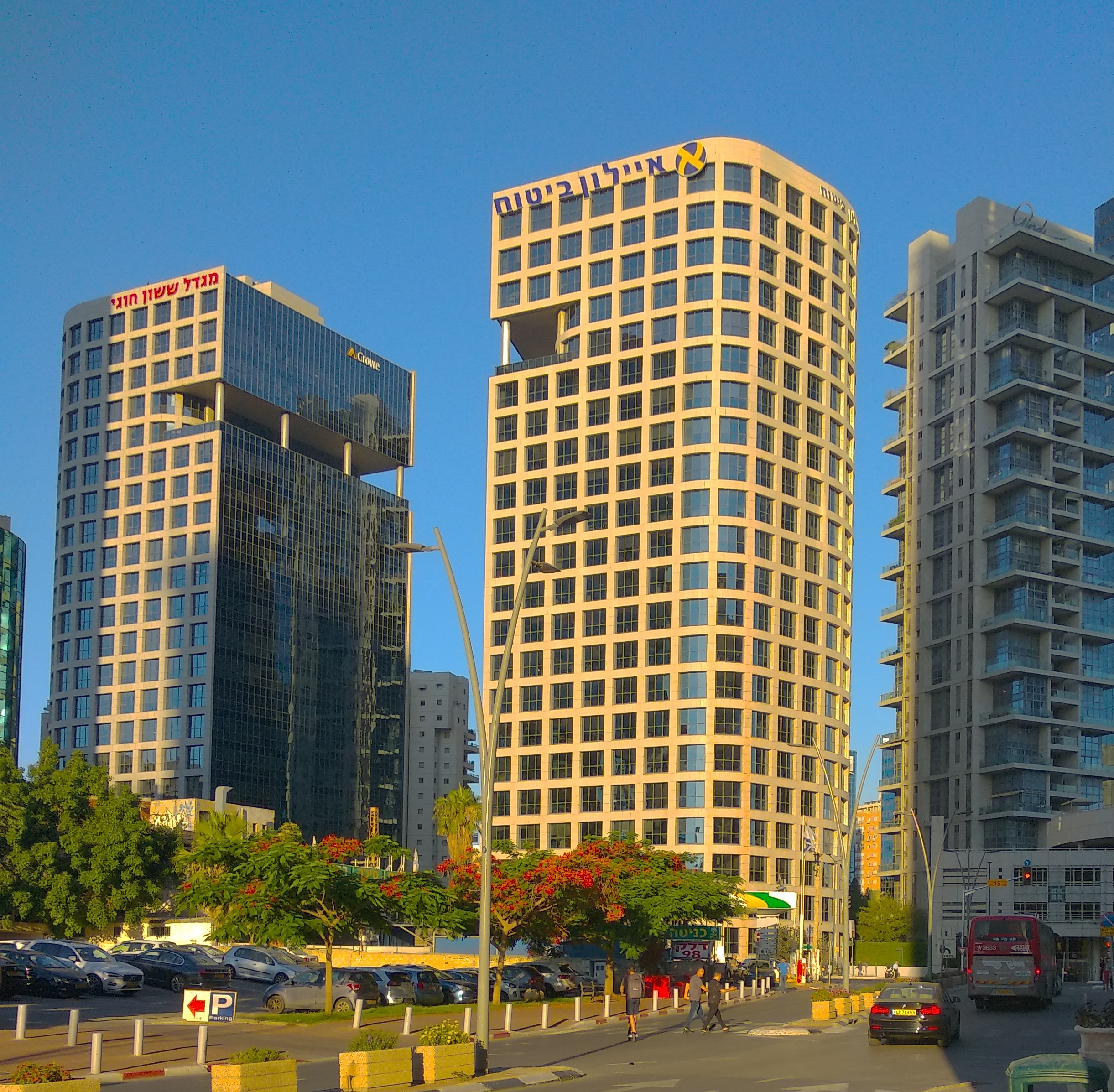 בית חברת הביטוח "איילון", רמת גן